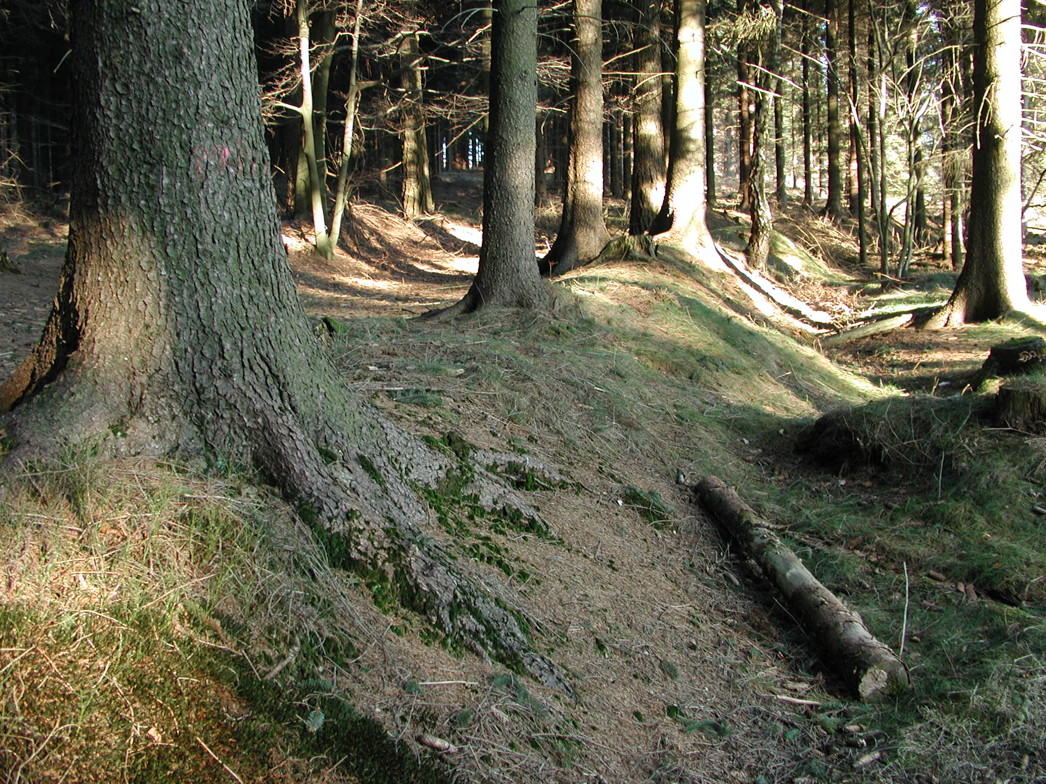 Reste sowohl der Barmer als auch der Elberfelder Linie der Bergischen Landwehr den Marscheider Bach - hier in der Nähe von Herbringhausen .